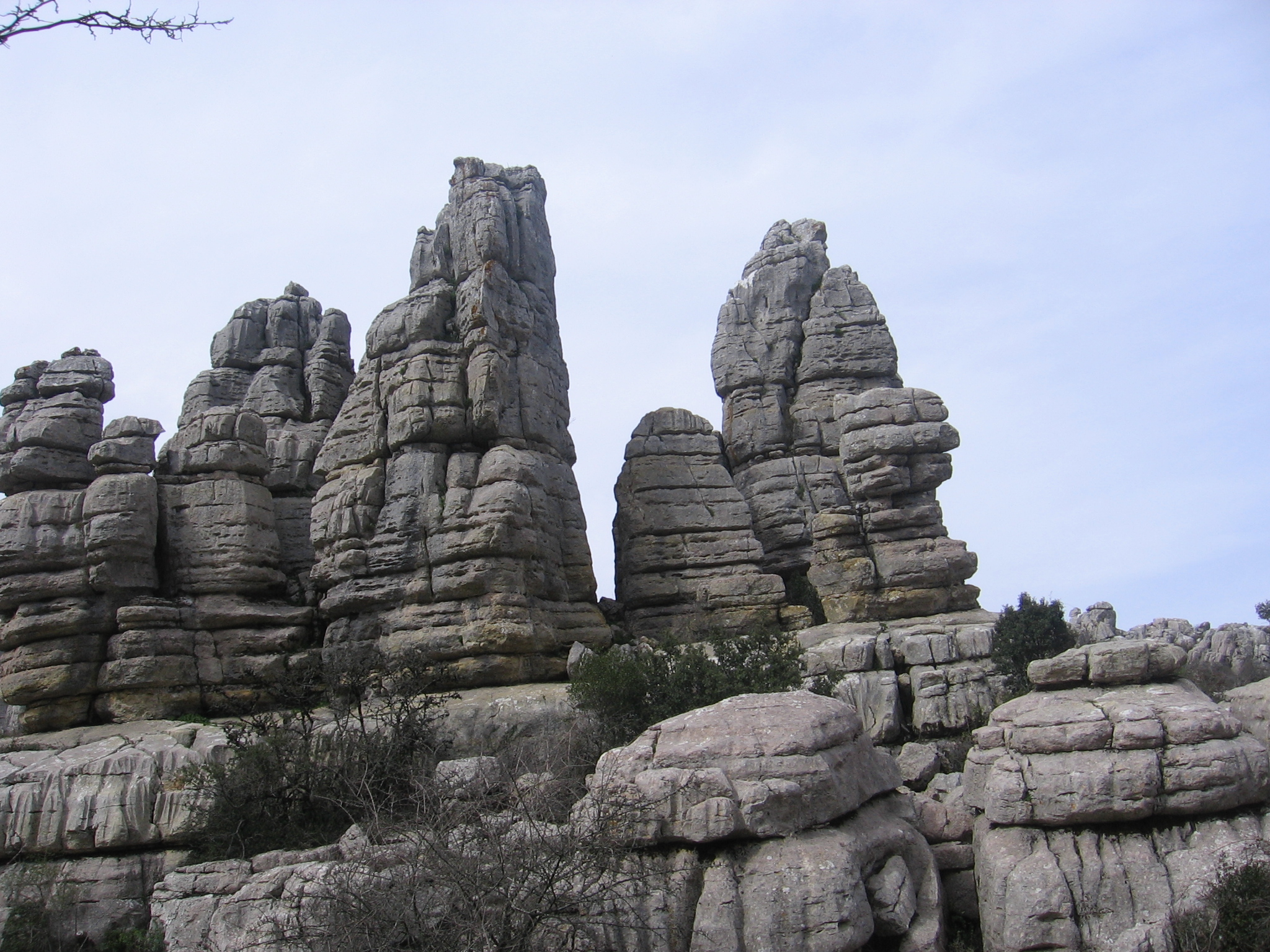 Kartformation in El Torcal de Antequera, Málaga, Andalusien, Spanien.